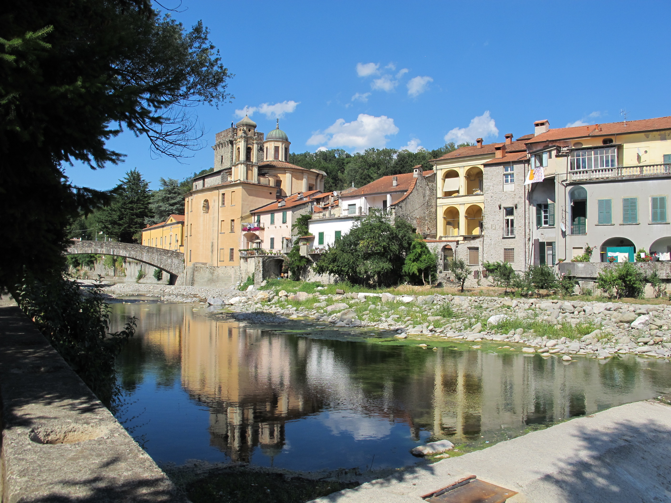 Pontremoli, lungomagra